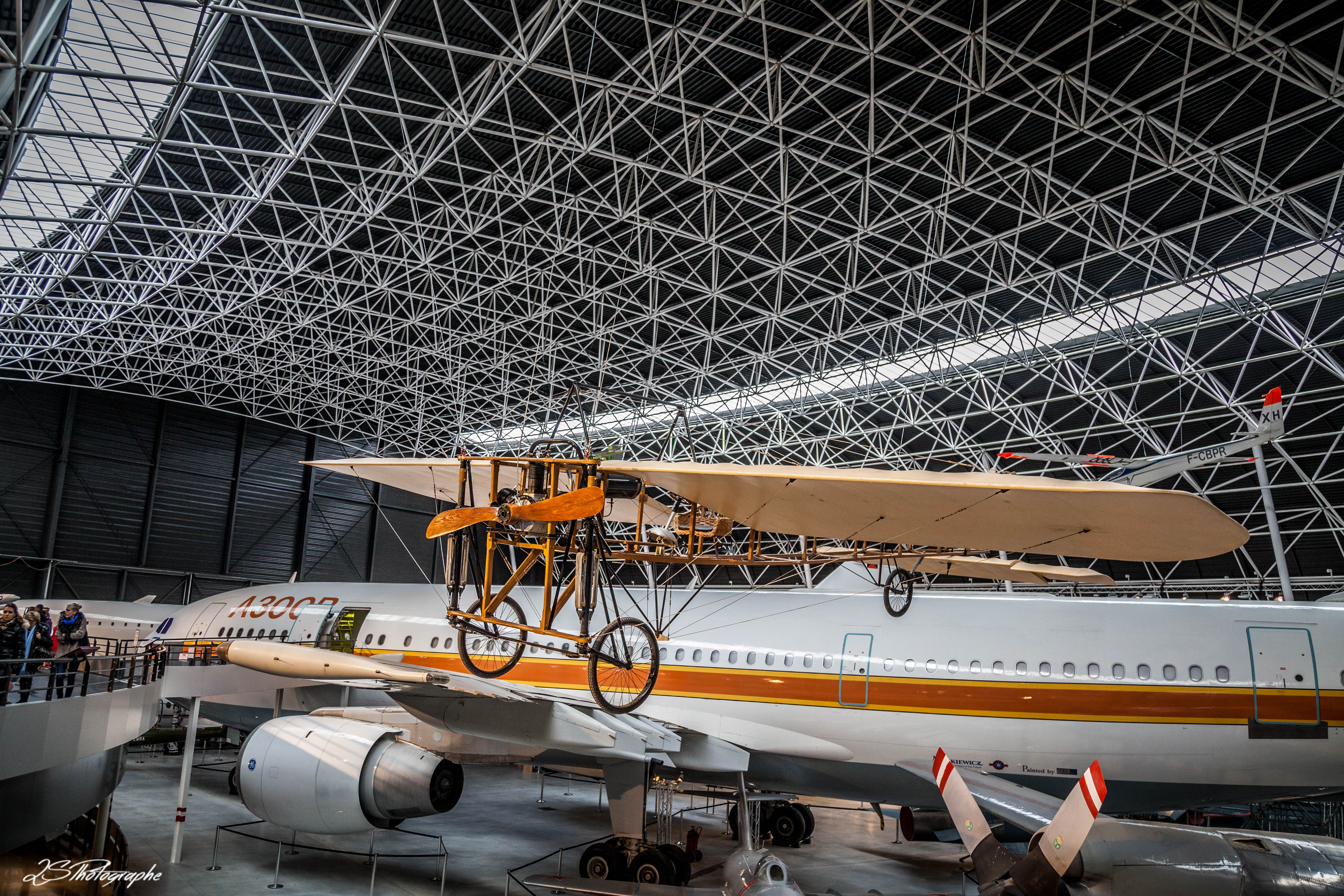 Aéroscopia